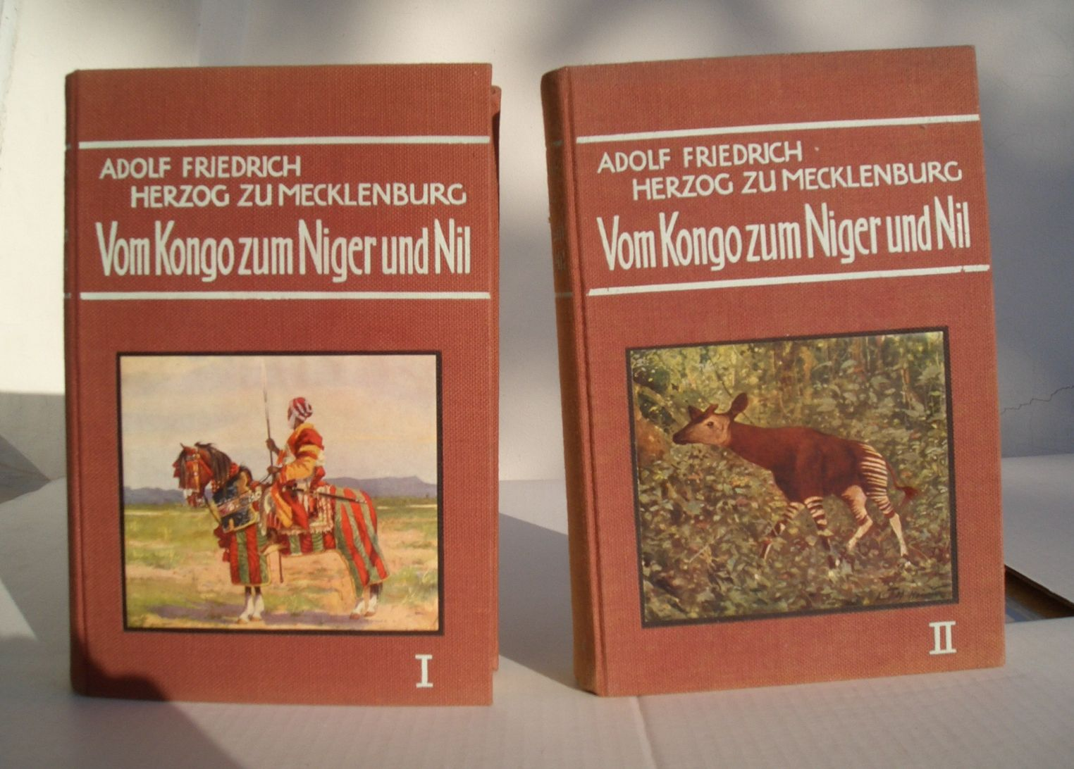 Adolf Friedrich Herzog von Mecklenburg: Vom Kongo zum Niger und Nil. Berichte der deutschen Zentralafrika-Expedition 1910/1911. Mit 512 bunten und einfarbigen Abbildungen nach Photographien und Zeichnungen, sowie mit 6 Karten. Leipzig, Brockhaus, 1912. Erste Ausgabe/First Edition. Einbandillustrationen von Ernst M. Heims (1886-1922).